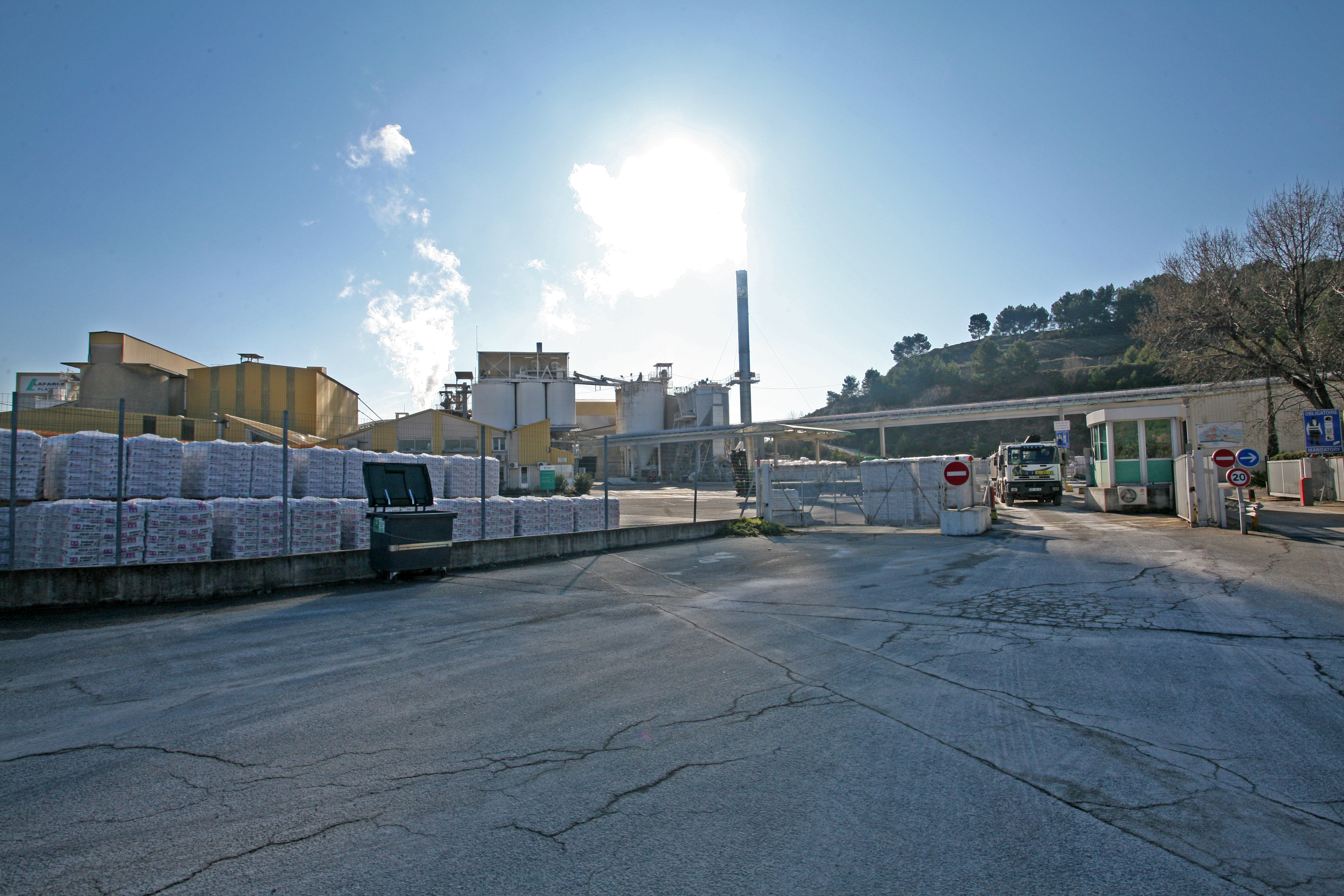 Carrière de gypse de Mazan, platrerie, France